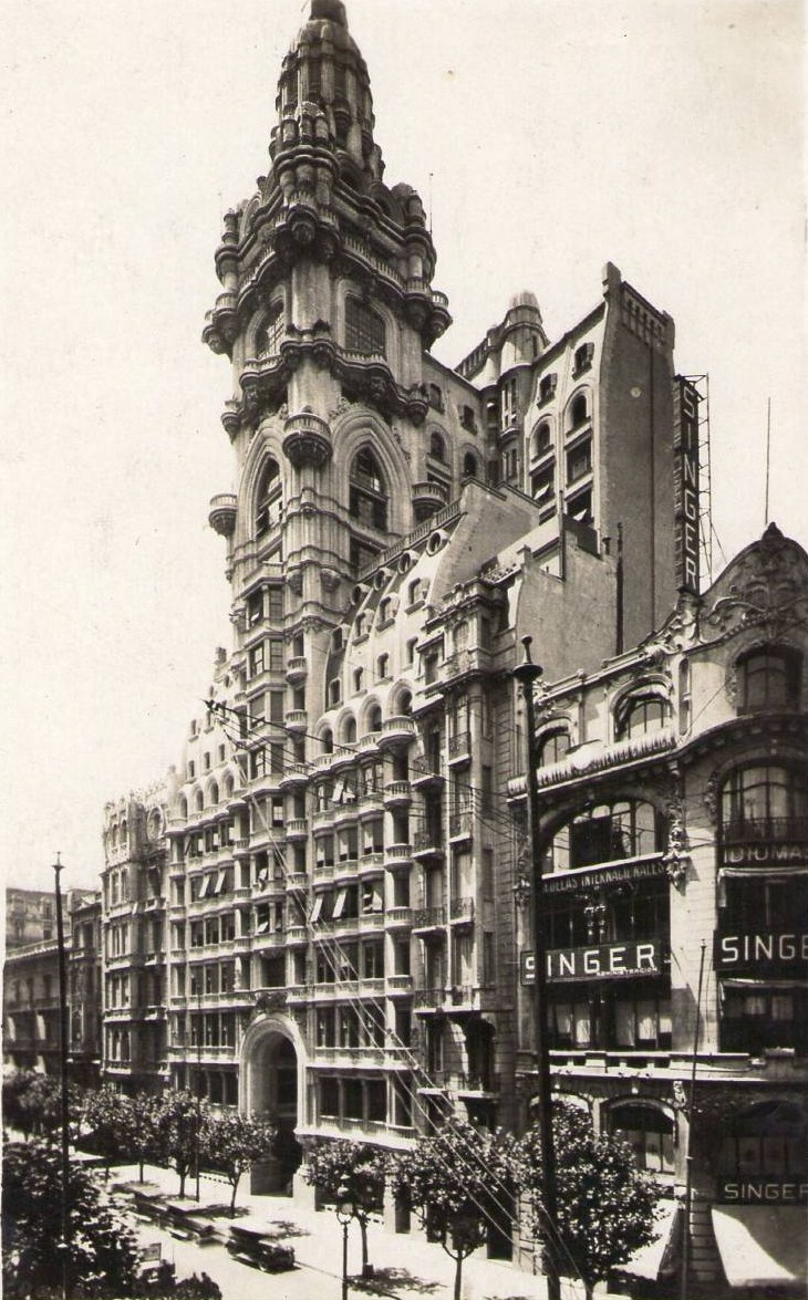 Vista del Palacio Barolo, desde la esquina de Avenida de Mayo y San José, en Buenos Aires. A la derecha, el edificio donde funcionaba la firma Singer de máquinas de coser.